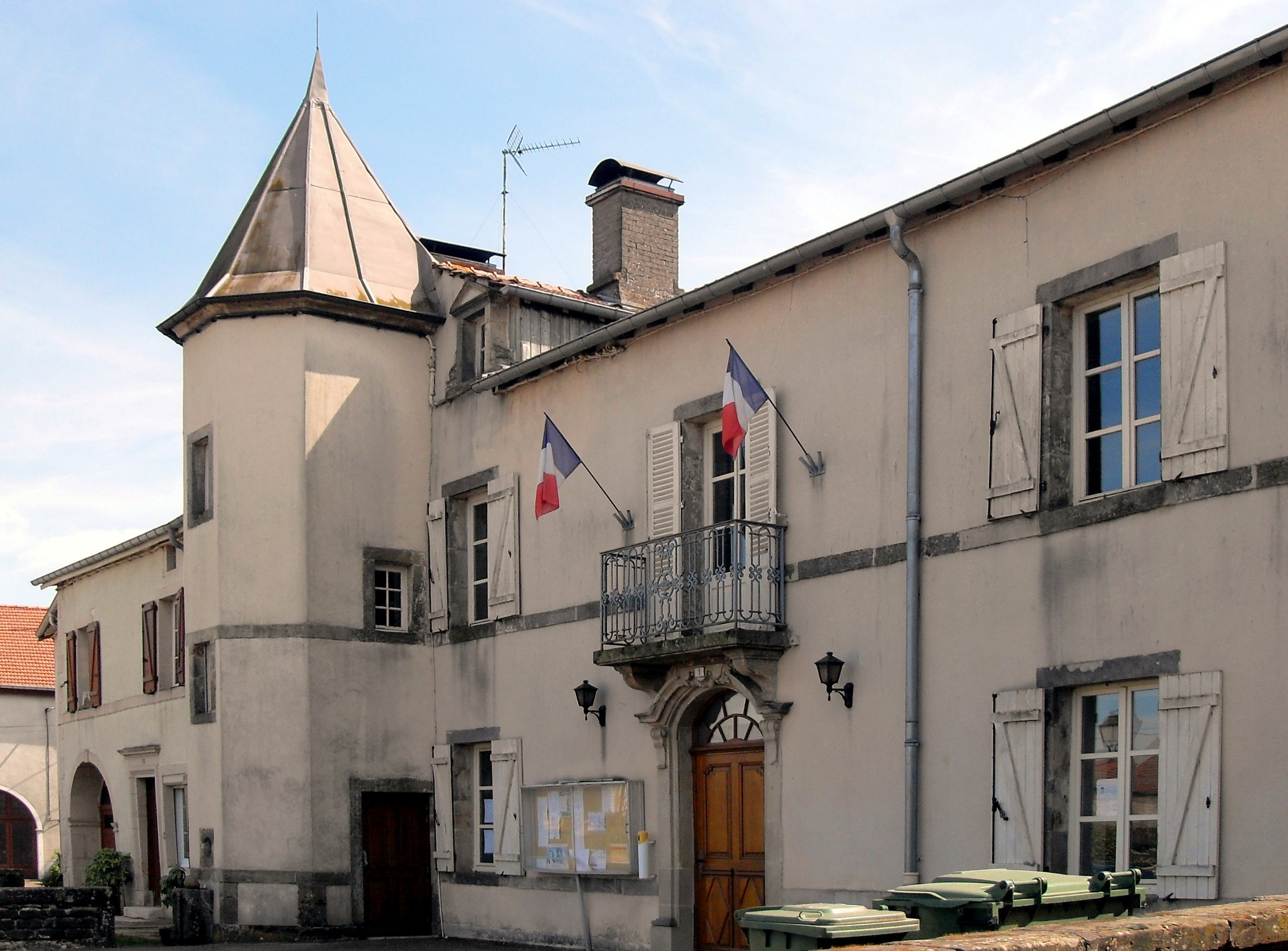 La mairie de Sauville